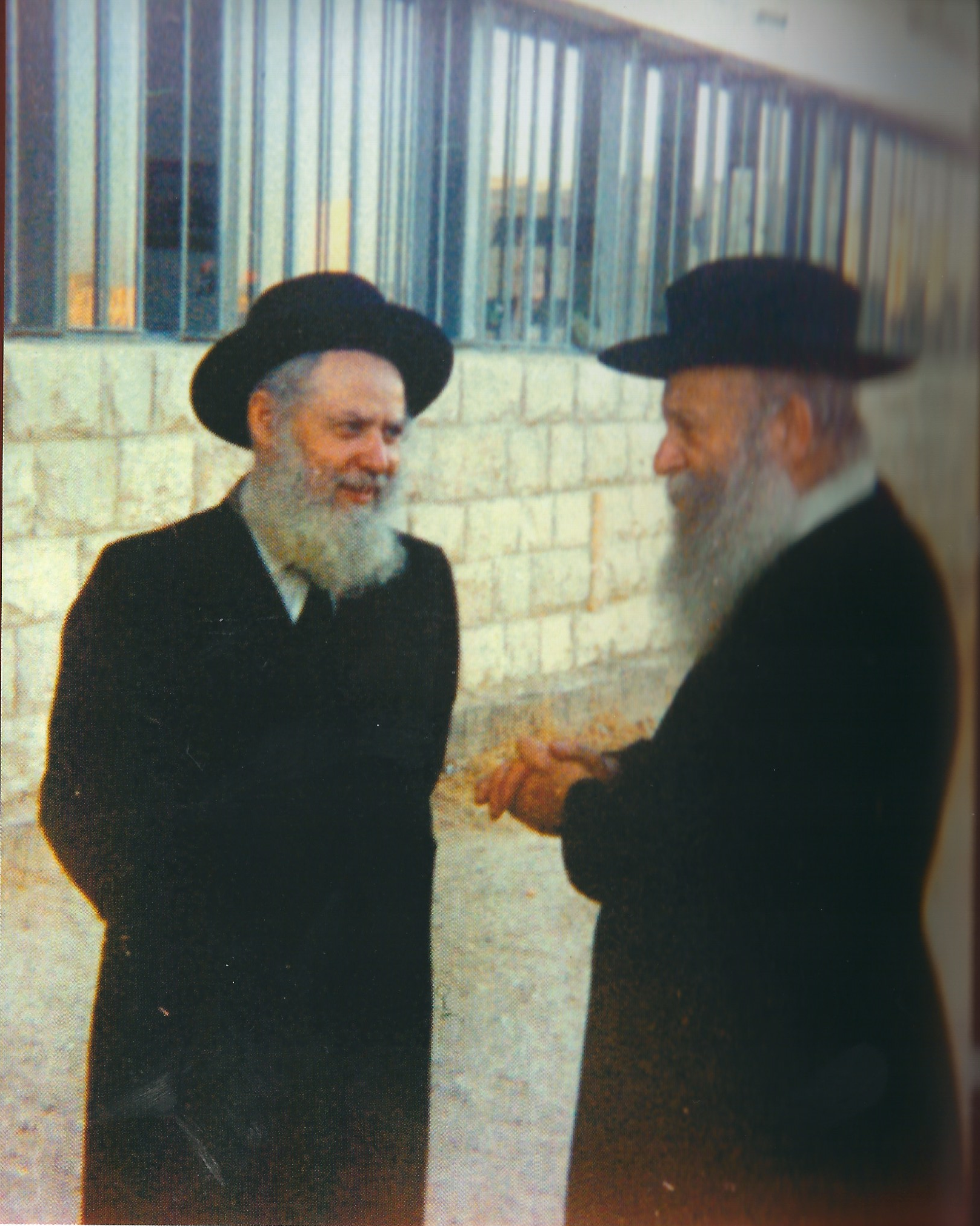 הר צבי יהודה קוק והרב שפירא בכניסה לספרית מרכז הרב